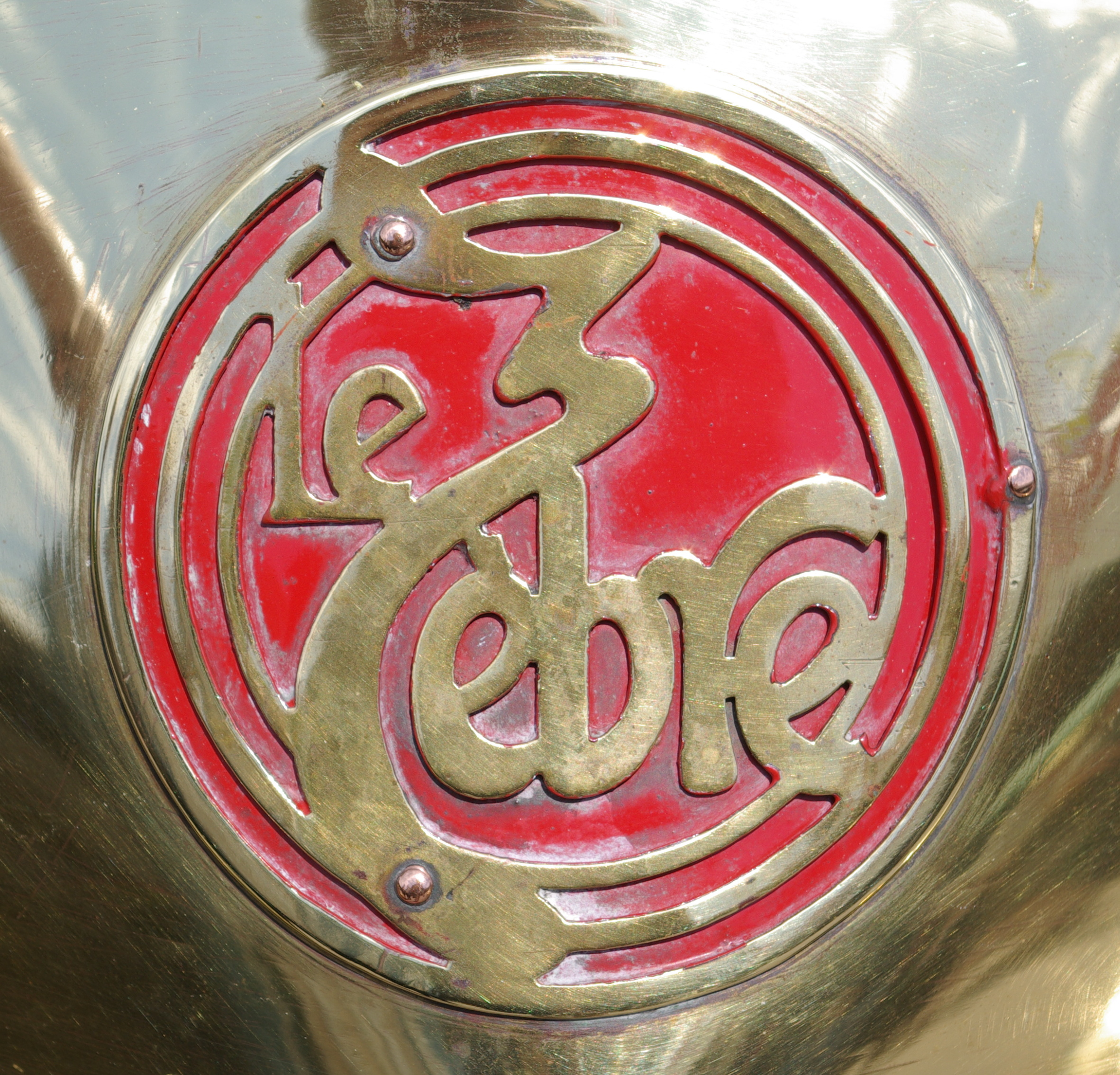 Logo der ehemaligen Automarke Le Zebre